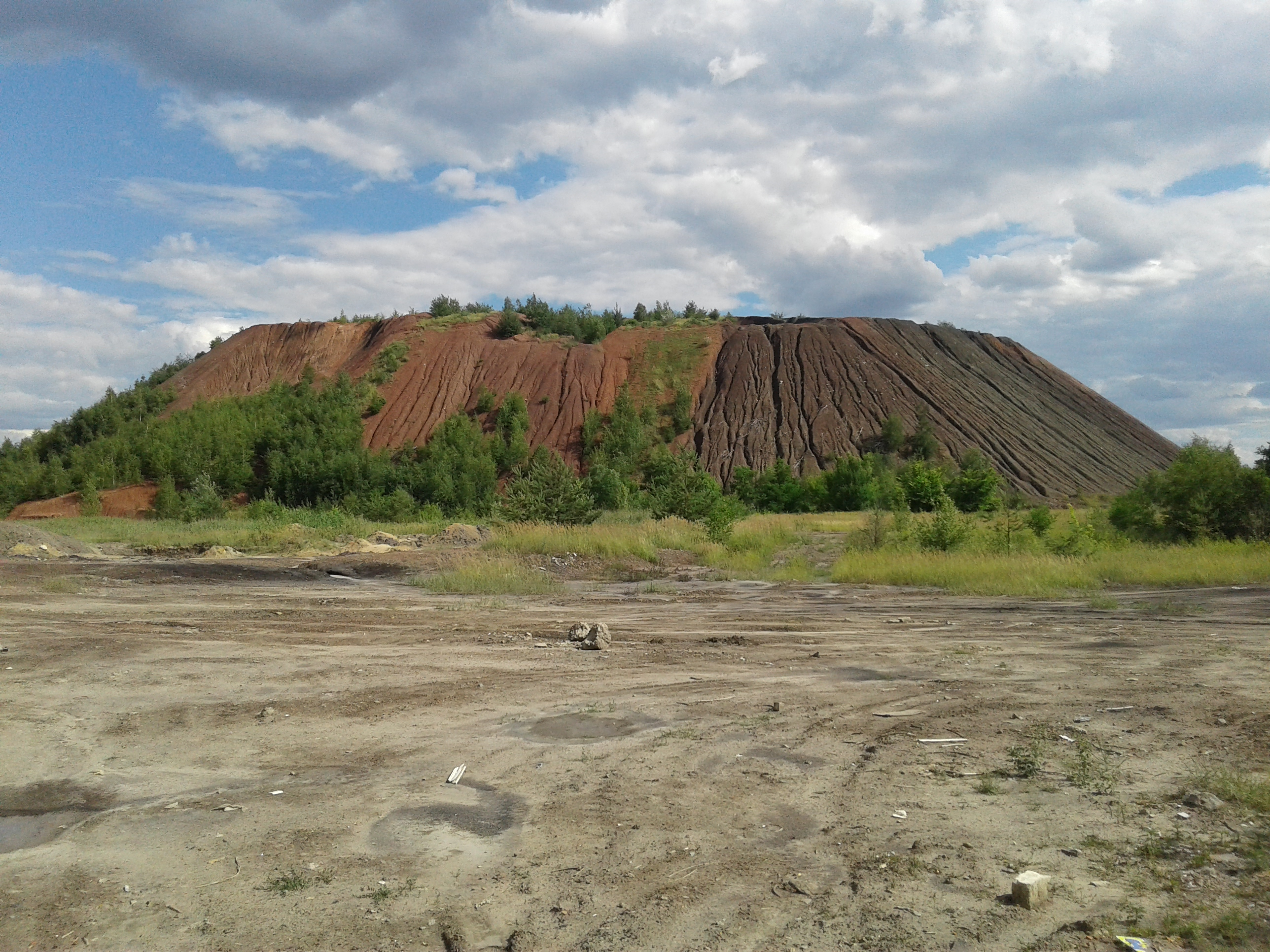 Терикон раніше діючої шахти №1